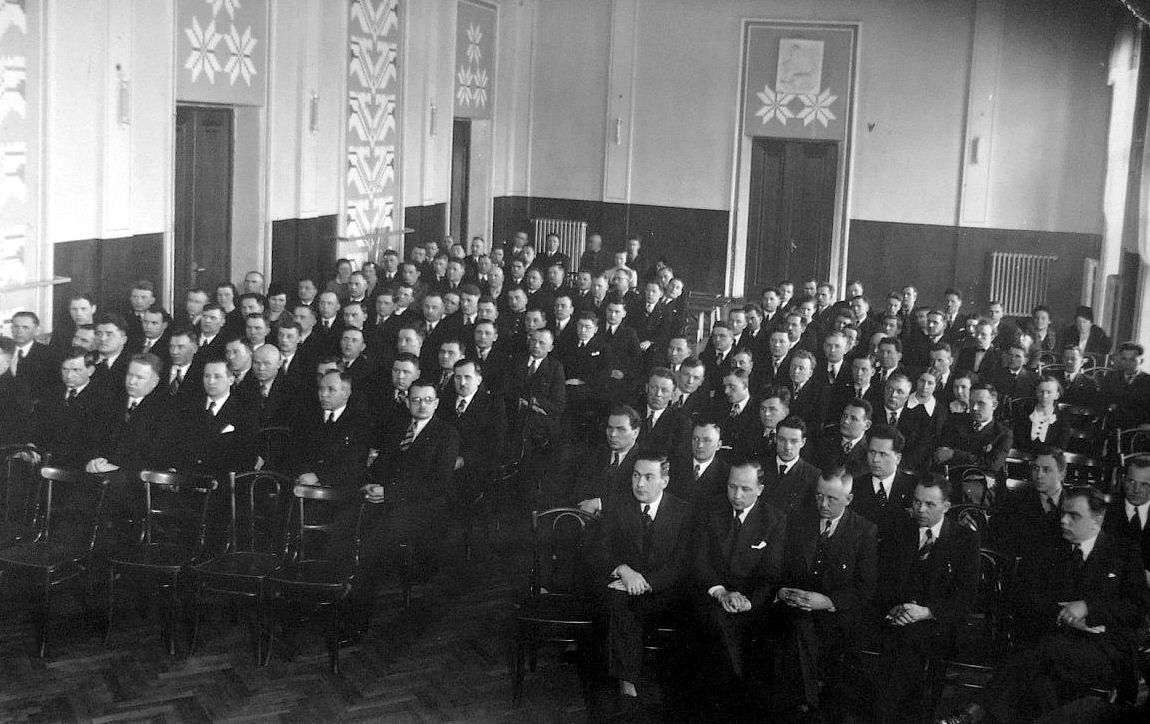 Lietuvos pienininkų ir kontrolasistentų draugijos suvažiavimas Kaune 1938 m. (Laisves al. 3b).